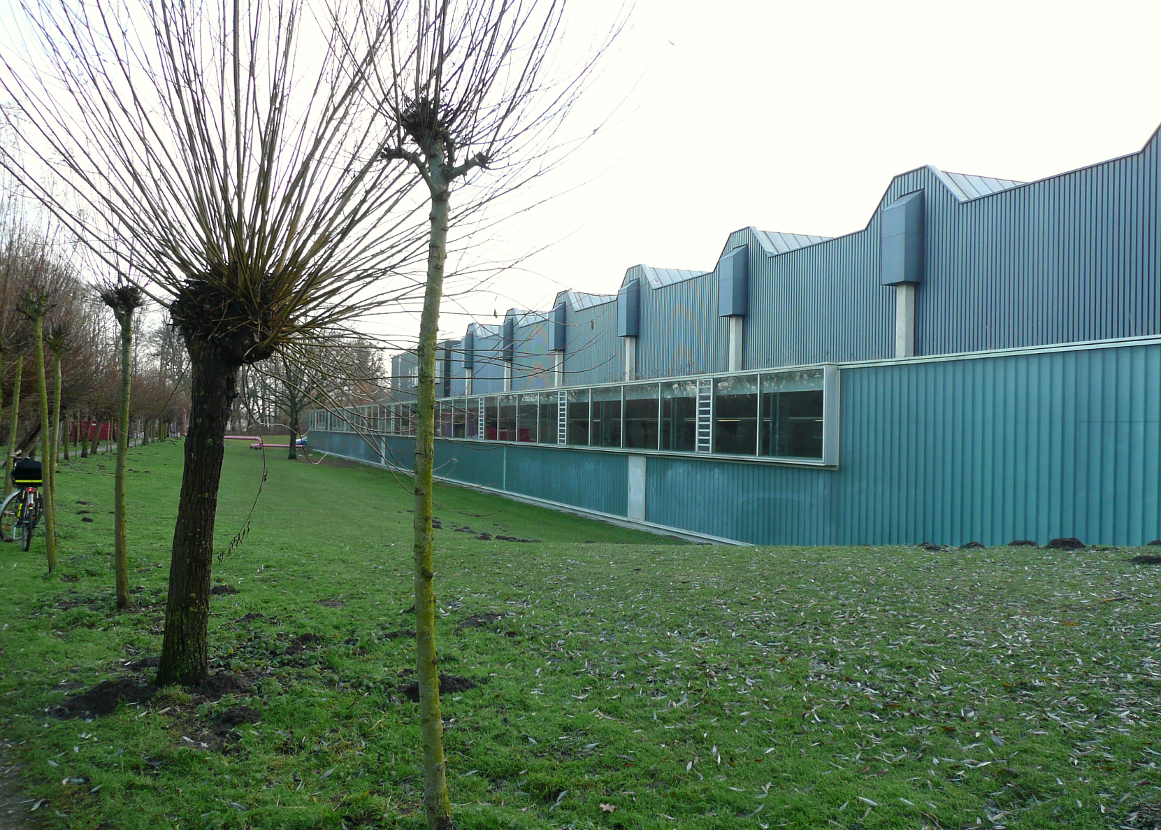 Olympiastützpunkt Niedersachsen